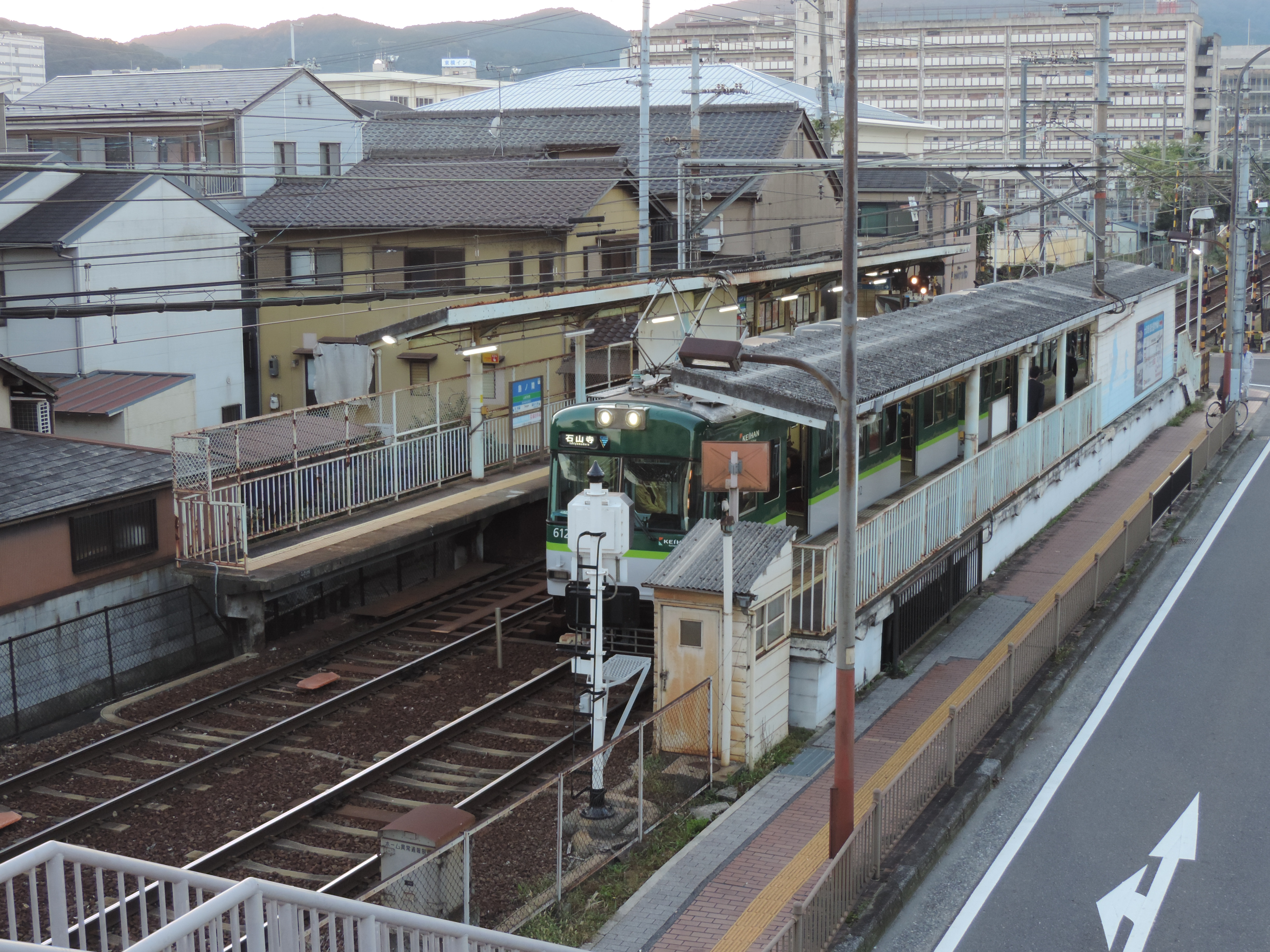 島ノ関駅（京阪石山坂本線：滋賀県大津市） Nikon Coolpix P520